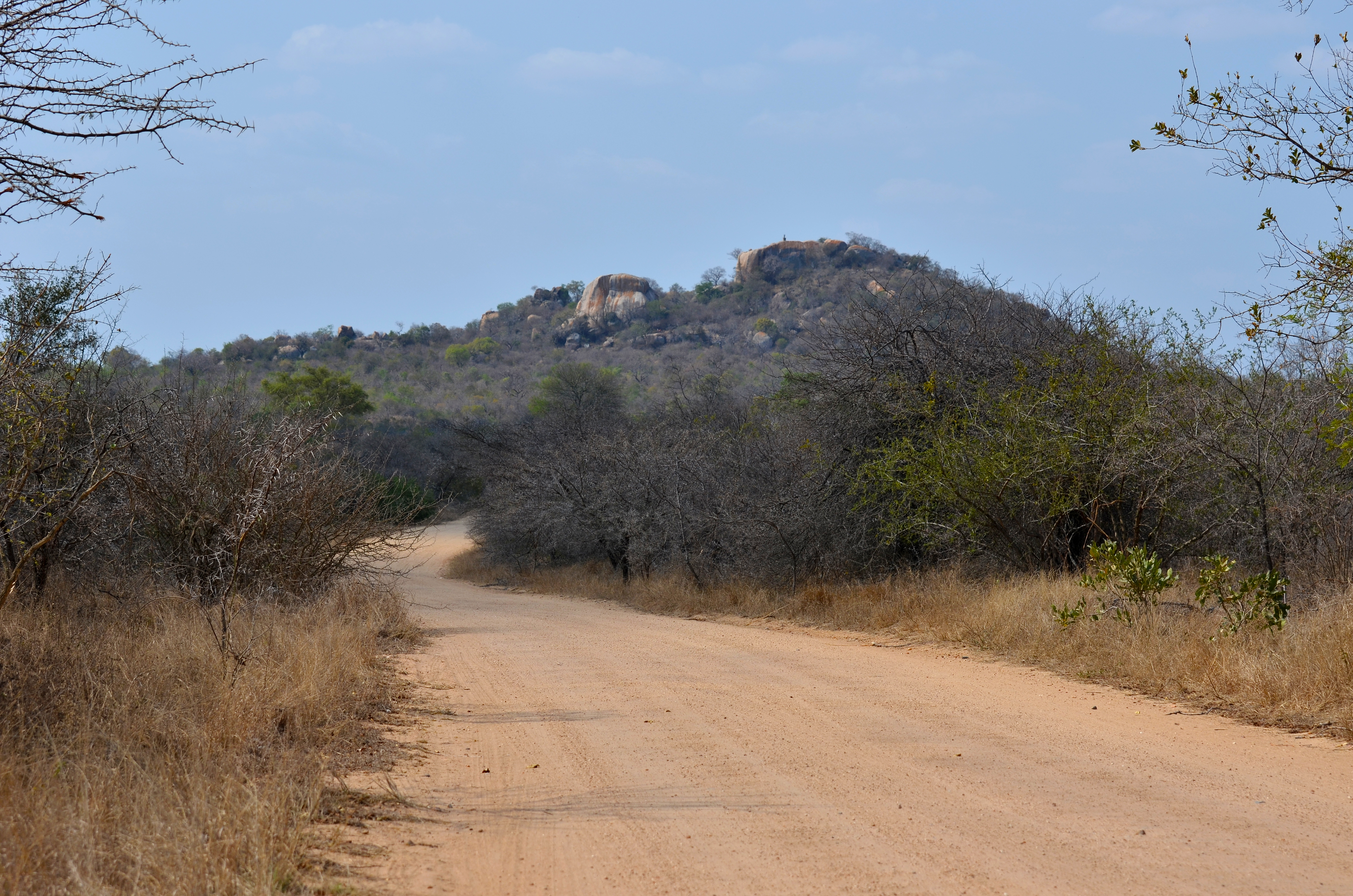 Stevenson Hamilton Memorial - Krugerův NP, Jihoafrická republika